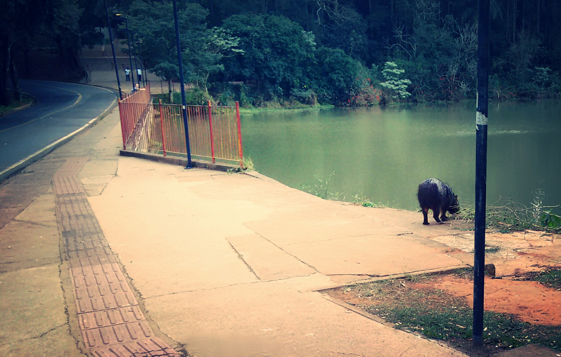 Animais Vivem no Campus São Carlos